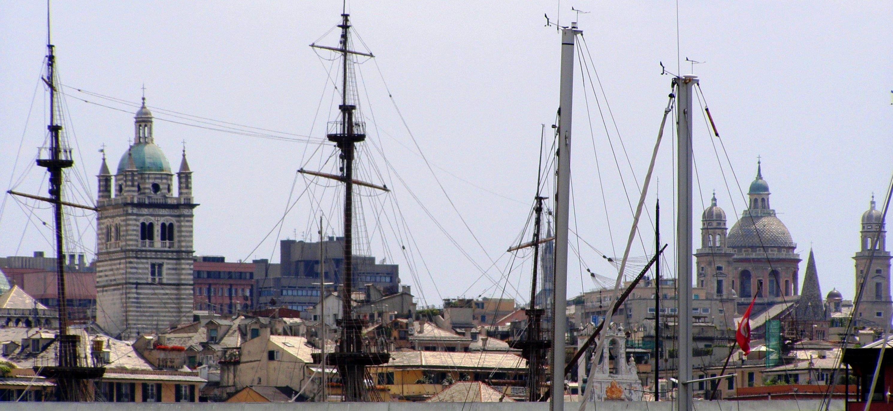 Genova, scorcio del porto e del centro storico.